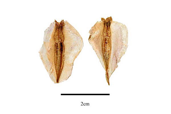 Burmannia bicolor Semina